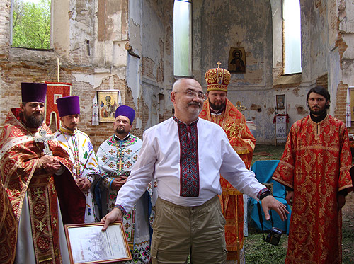 Євген Жеребецький на освяченні храму в селі Білоцерківці